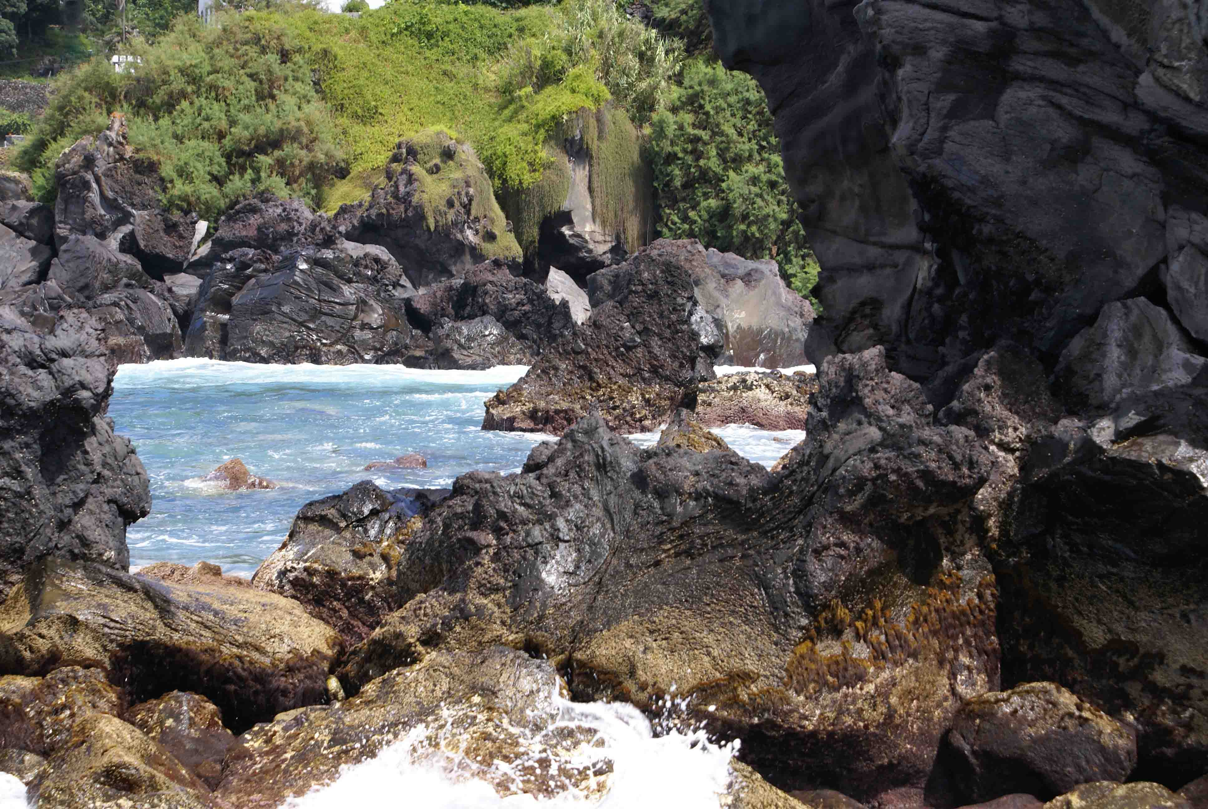 Uma das enseadas que formam a Baía de Villa Maria, em dia de tempestade, ilha Terceira, Açores, Portugal